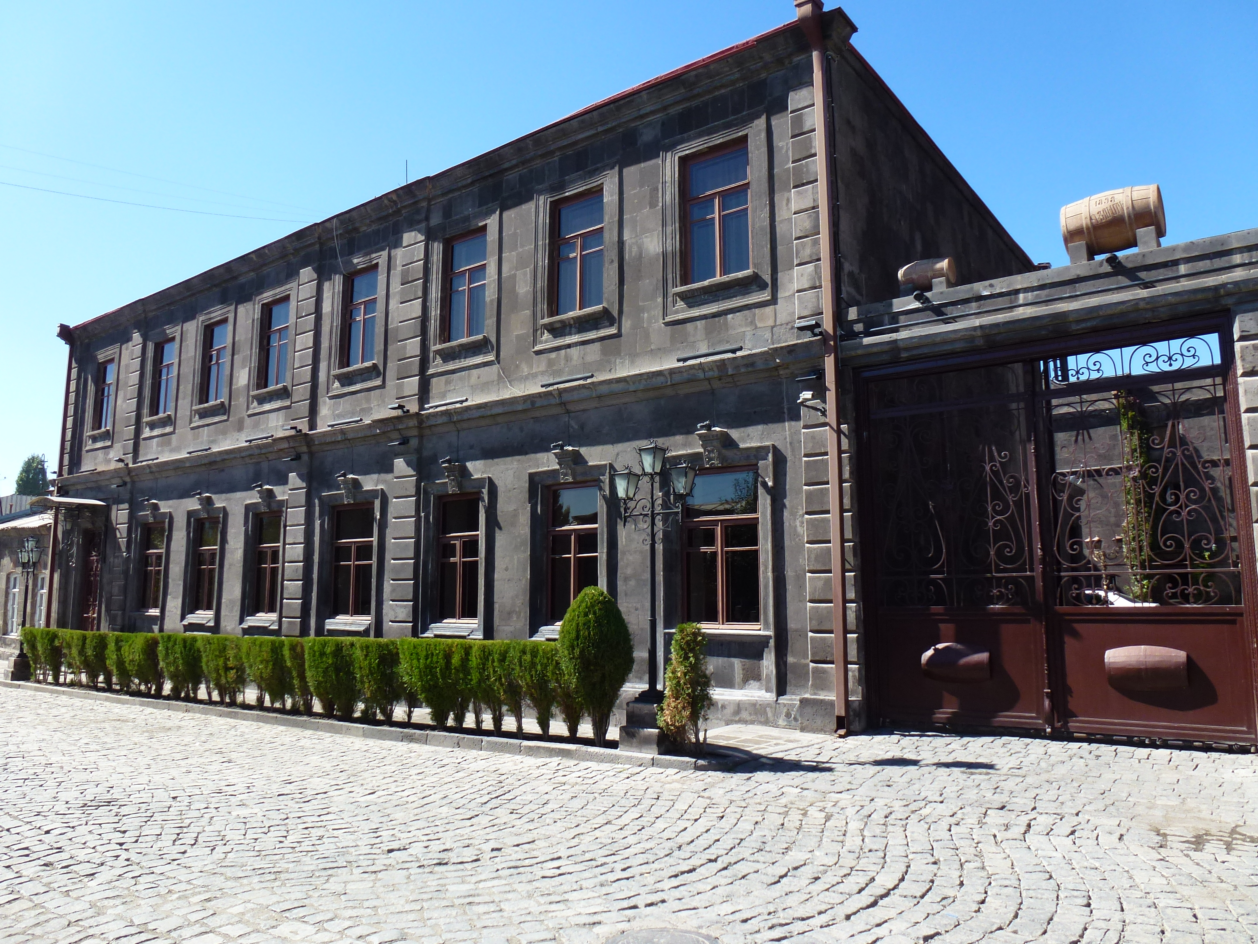 Ծաղիկյանի նախկին գարեջրի գործարանի շենքը 1/4.896